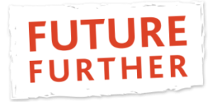 Tương Lai